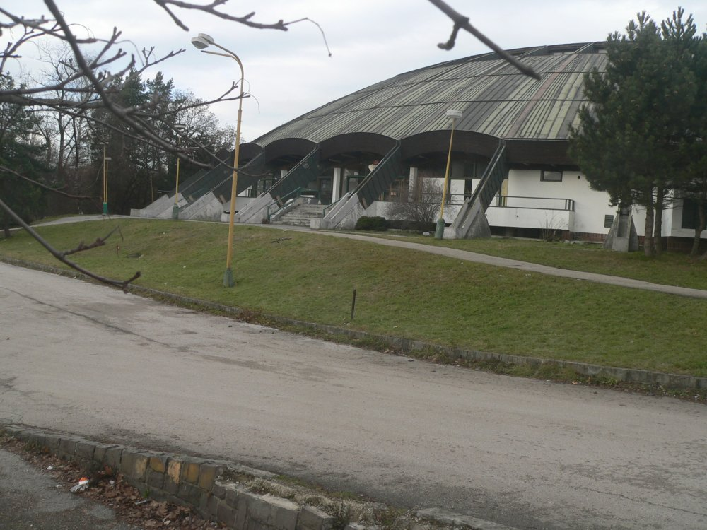 Sport hall in Zilina, Slovakia